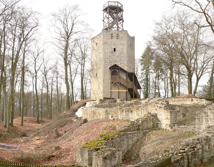 Burg Lichtenberg, Salzgitter, Germany